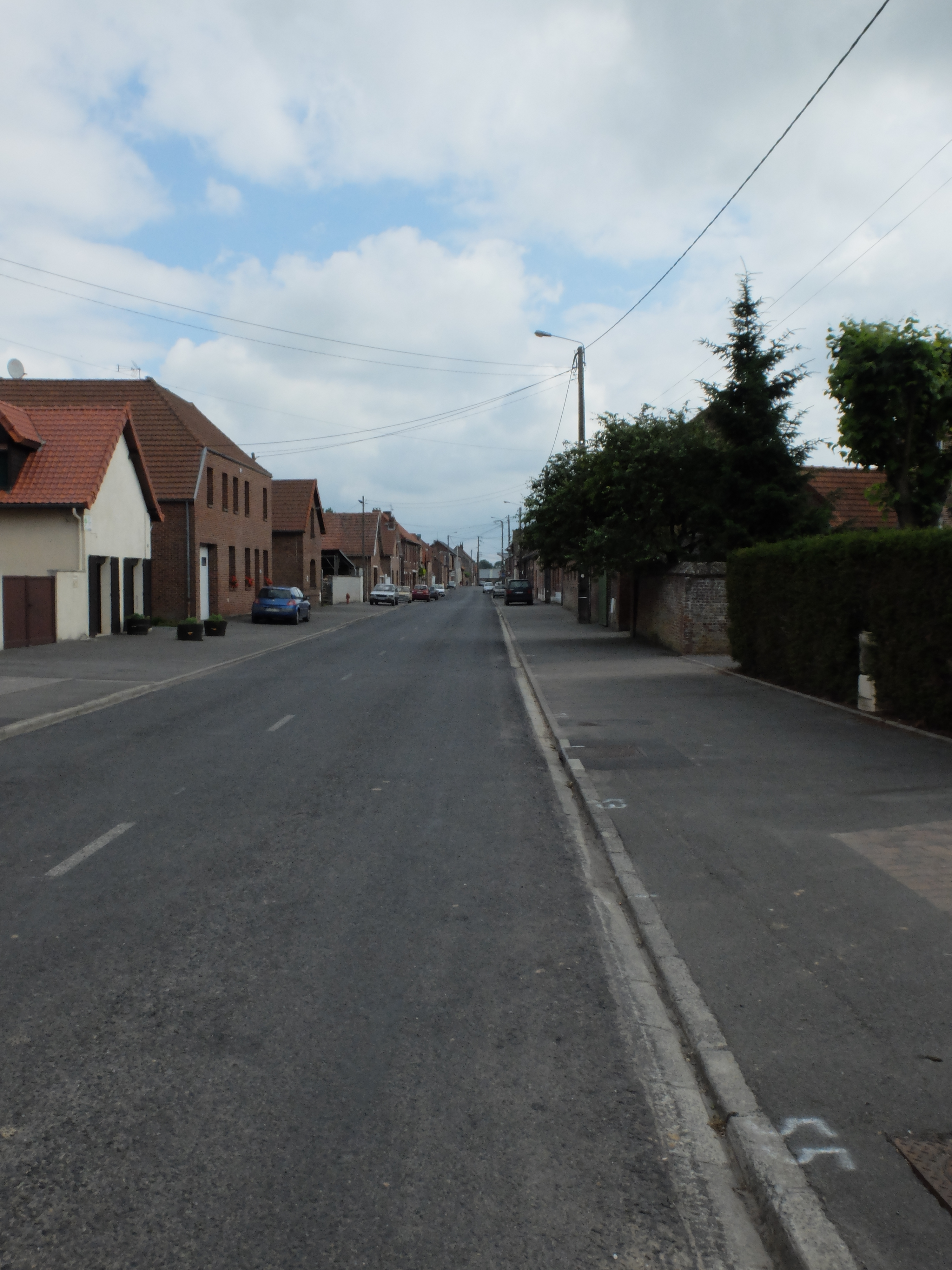 Vue d'une rue de Rumaucourt.